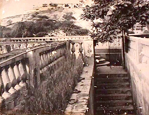 Foto histórica del Castillo de Santa María de la Cabeza de antes del terremoto de Cumaná de 1928, fotografiada en el castillo de San Antonio de Cumaná, estado Sucre - Venezuela (1998)